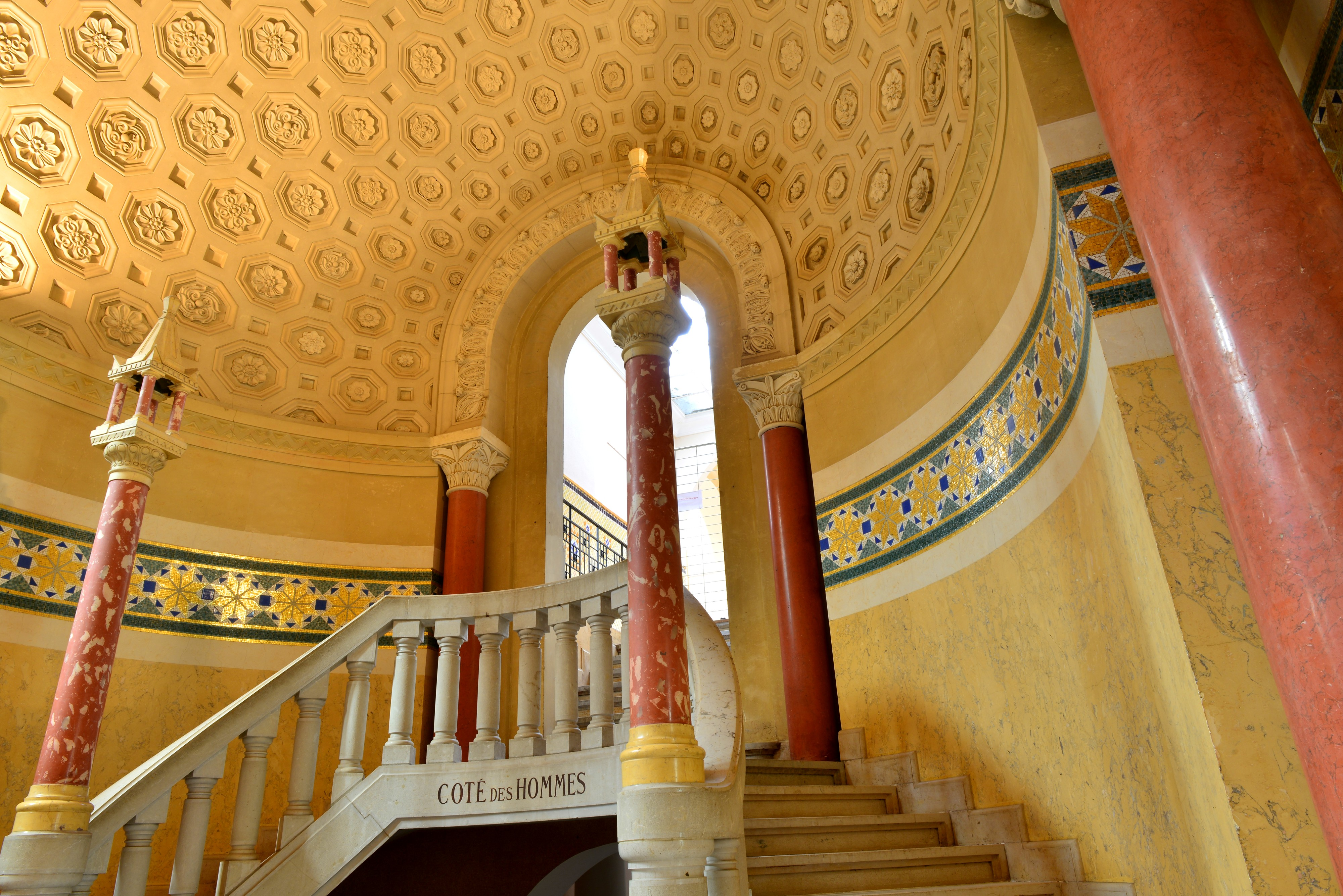 Les anciens Thermes de Châtel-Guyon